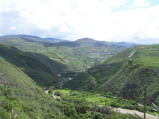 Valle del Rio Utcubamba, Amazonas, Peru